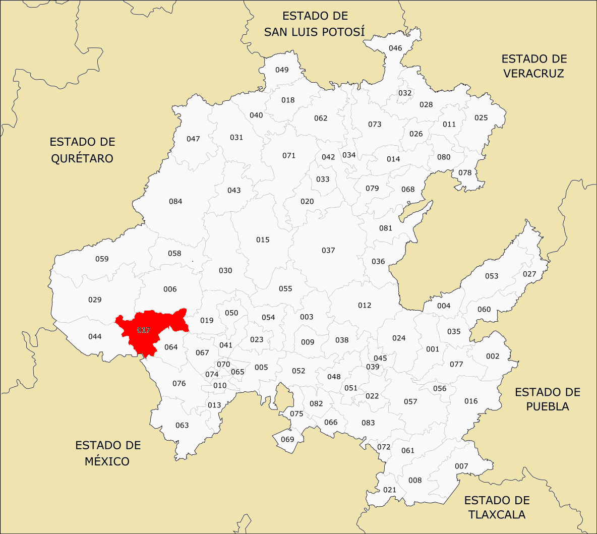 Municipio de Hidalgo